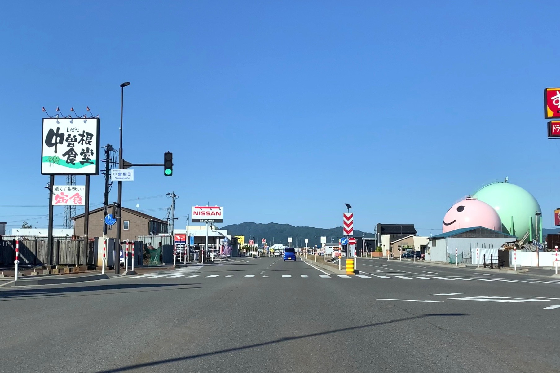 国道7号新発田バイパス 「中曽根町」交差点付近（2020年5月）「新発田拡幅」の事業により4車線化された区間。右は新発田ガスのガスタンク「ニコタン」。